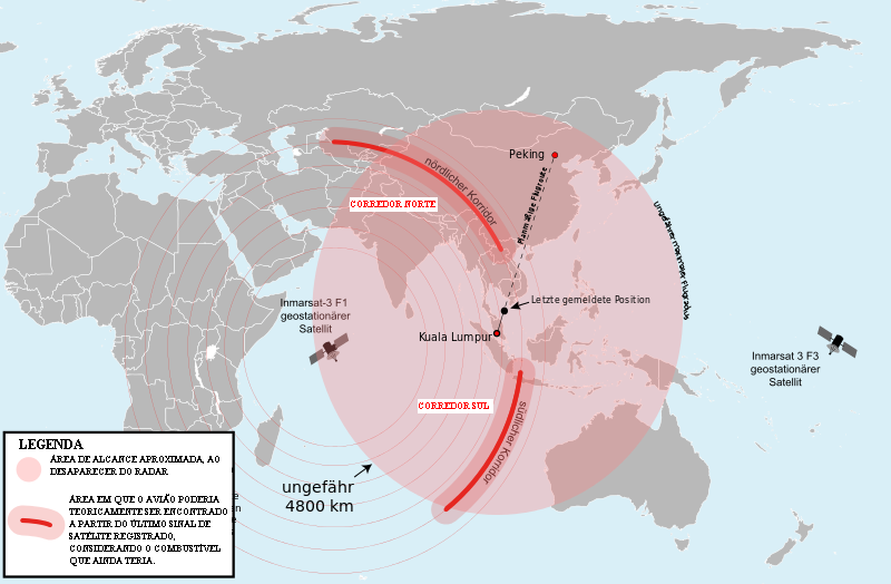 Áreas de busca a partir de 17 de março